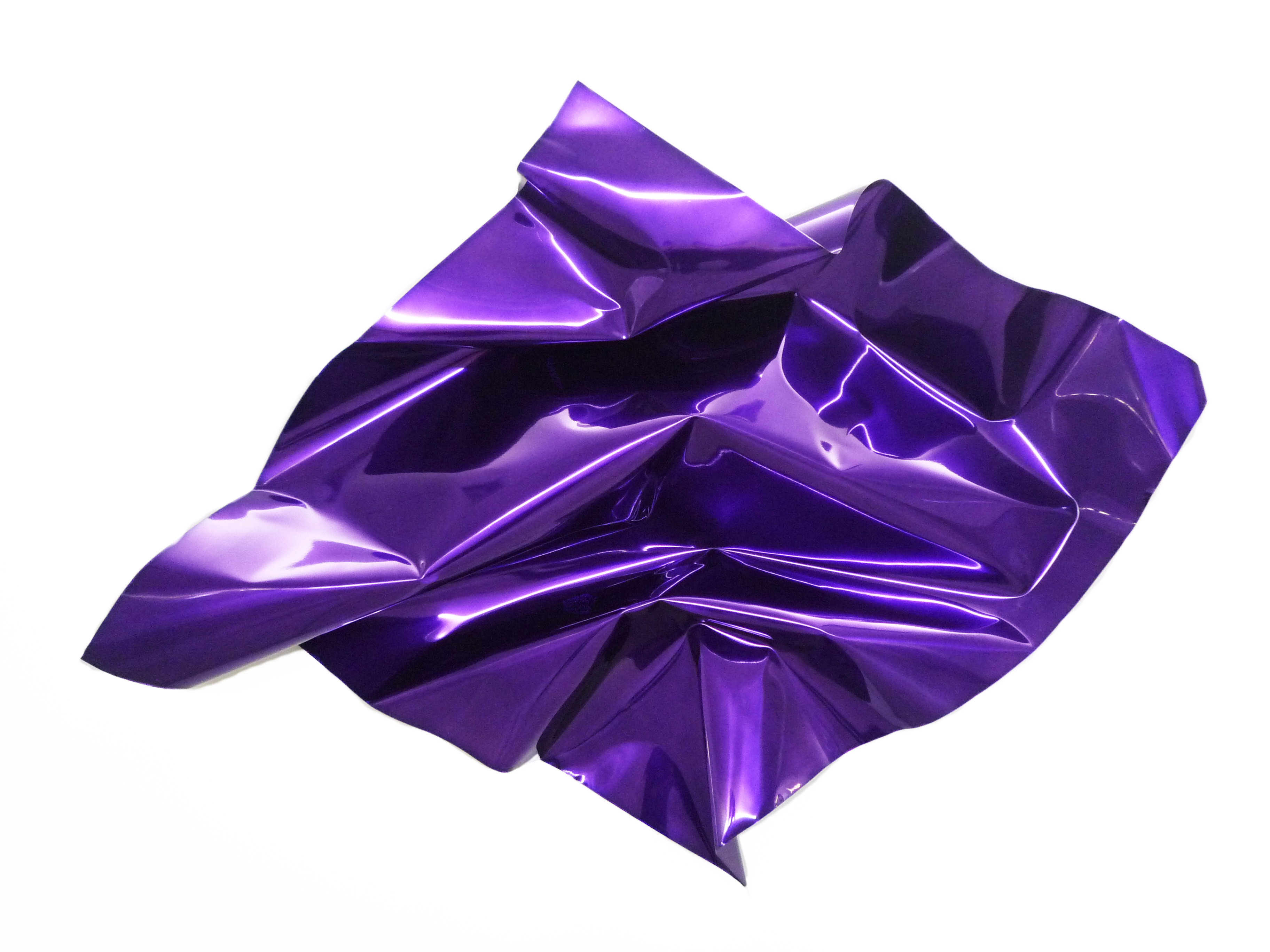 Aldo Chaparro "September 17, 2010" Stainless steel and electrostatic paint. 51.2 x 10.2 x 40.2 ( (130 x 26 x 102 cm). 2010